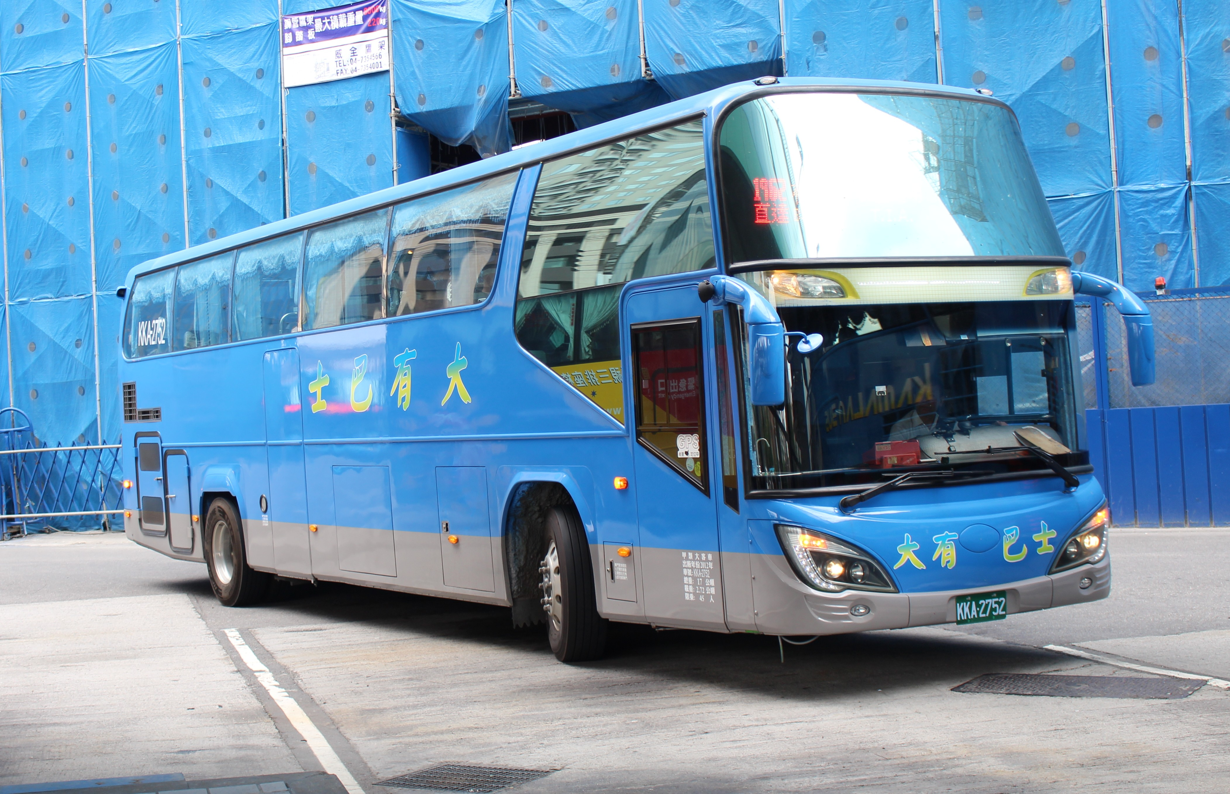 大有巴士KKA-2572 1962